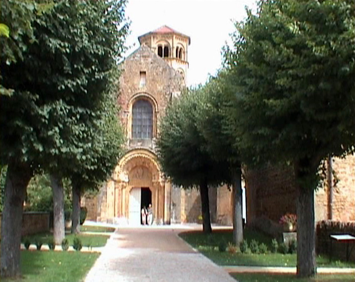 Anzy-le-Duc, Burgund